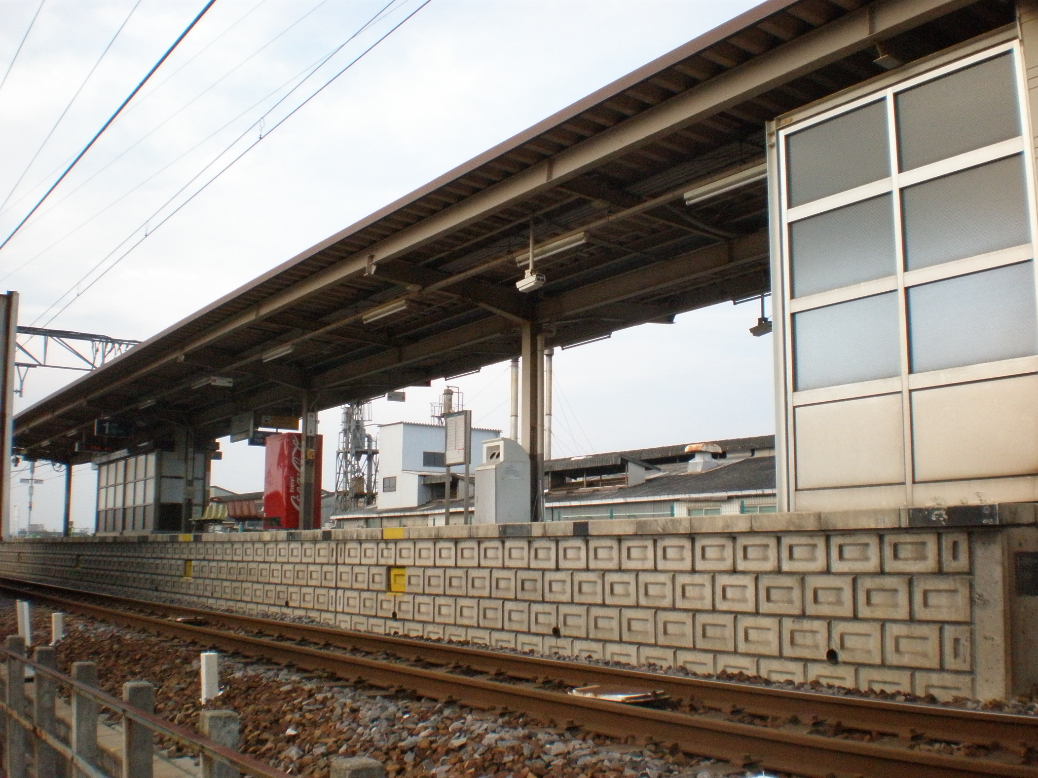 愛知県春日井市にある牛山駅